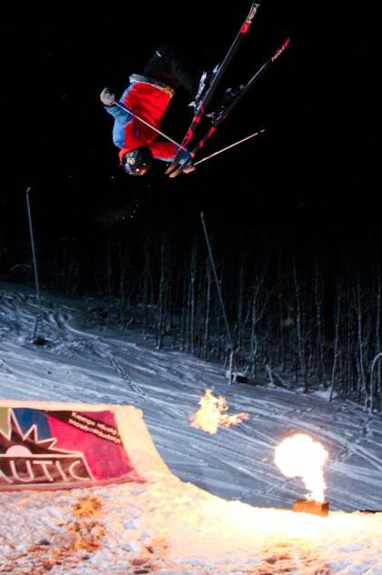 Titel.